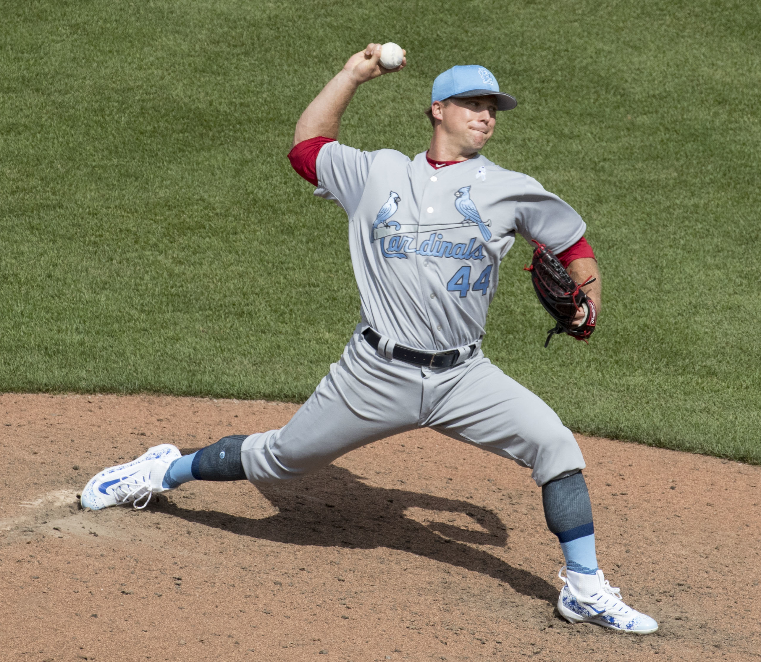 Cardinals at Orioles 6/18/17